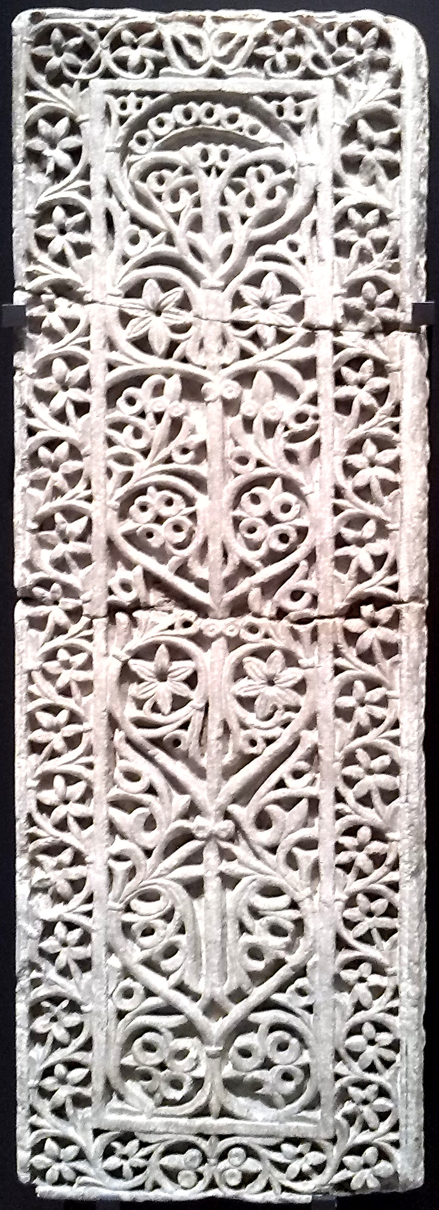 Panel decorativo de mármol de Denia, época del califato o de la taifa de Denia. Se conserva en el Museo Arqueológico Nacional (España). Altura = 104 cm; Anchura = 35,50 cm; Grosor = 8,50 cm. De un tallo axial brotan otros desarrollando círculos y corazones que albergan flores en forma de anillos, de seis pétalos y palmentas. Todo el conjunto rodeado de una orla que tiene un tallo que serpentea, en el cual se enlazan entretejidas flores de cinco pétalos. circulares y acorazonadas en donde se cobijan flores anilladas, flores de seis pétalos y palmetas. La orla del borde presenta un tallo serpenteante en el que se entrelazan flores de cinco pétalos.